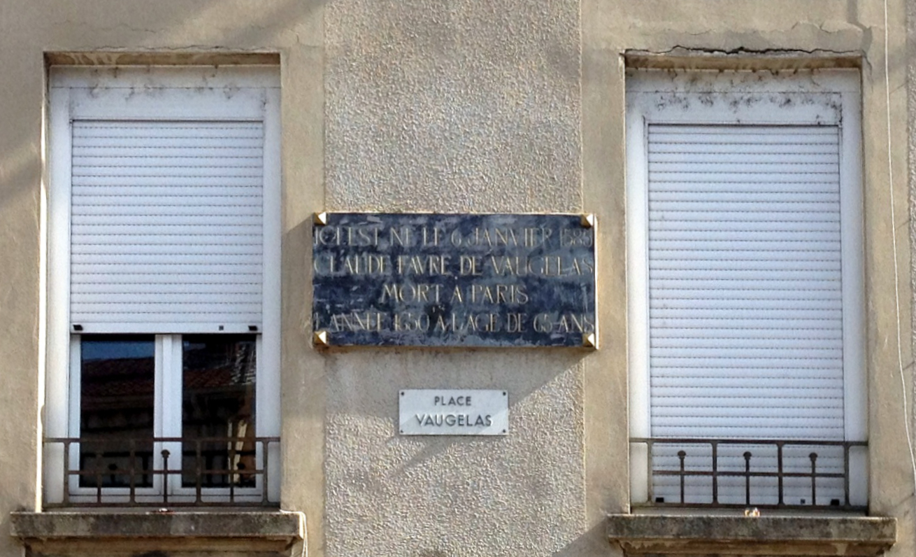 Plaque de la maison natale de Vaugelas à Meximieux.